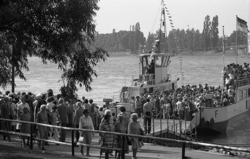 Bundesgartenschau in Bonn.